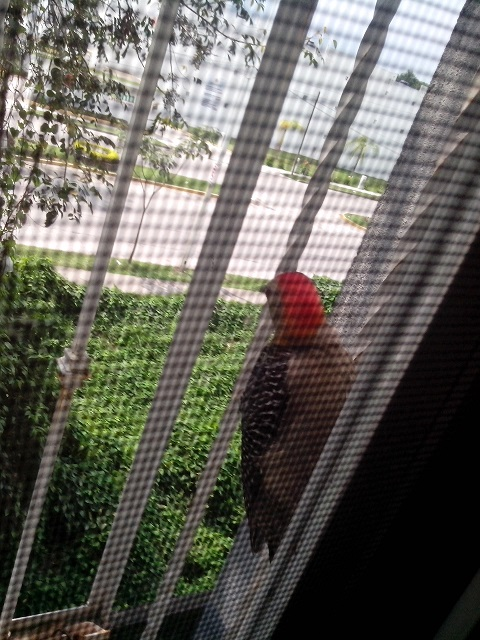 Carpintero Cabeza Roja en Poza Rica, Veracruz, México